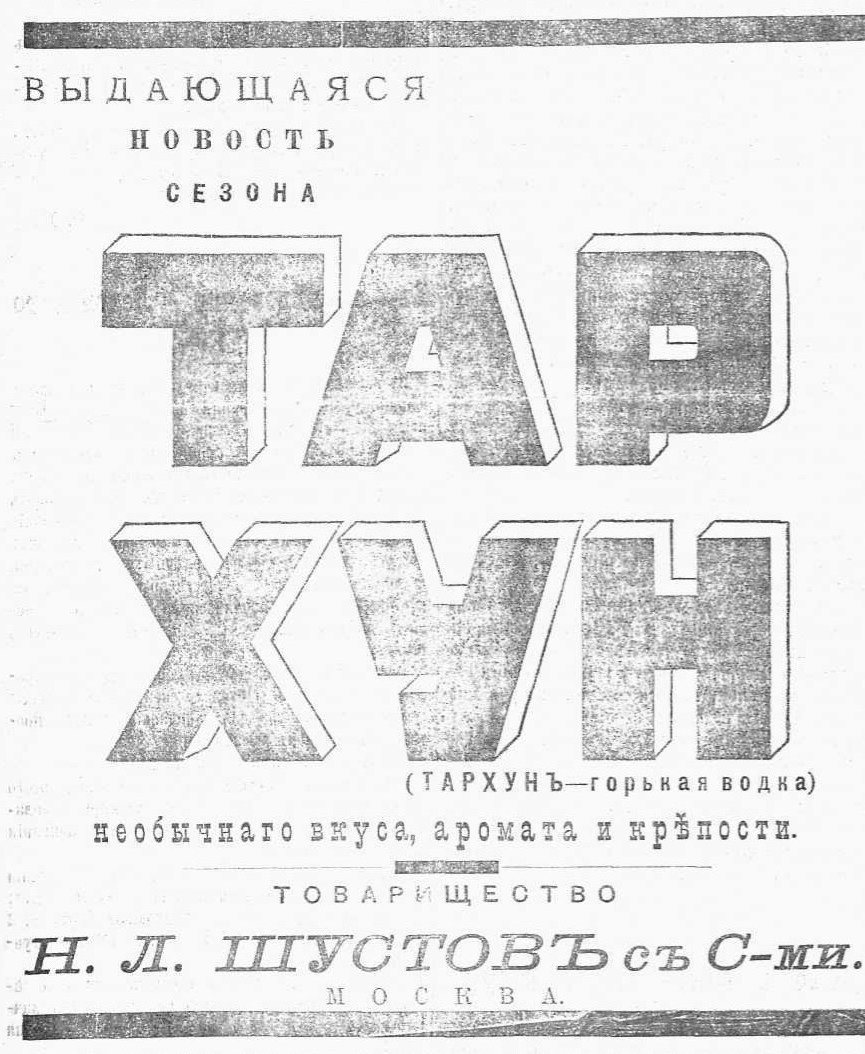 Газета «Архангельск. Ежедневная газета (кроме дней послепраздничных). Издавалась с № 1, 11 января 1907 г. по № 273, 9 декабря 1917 г.